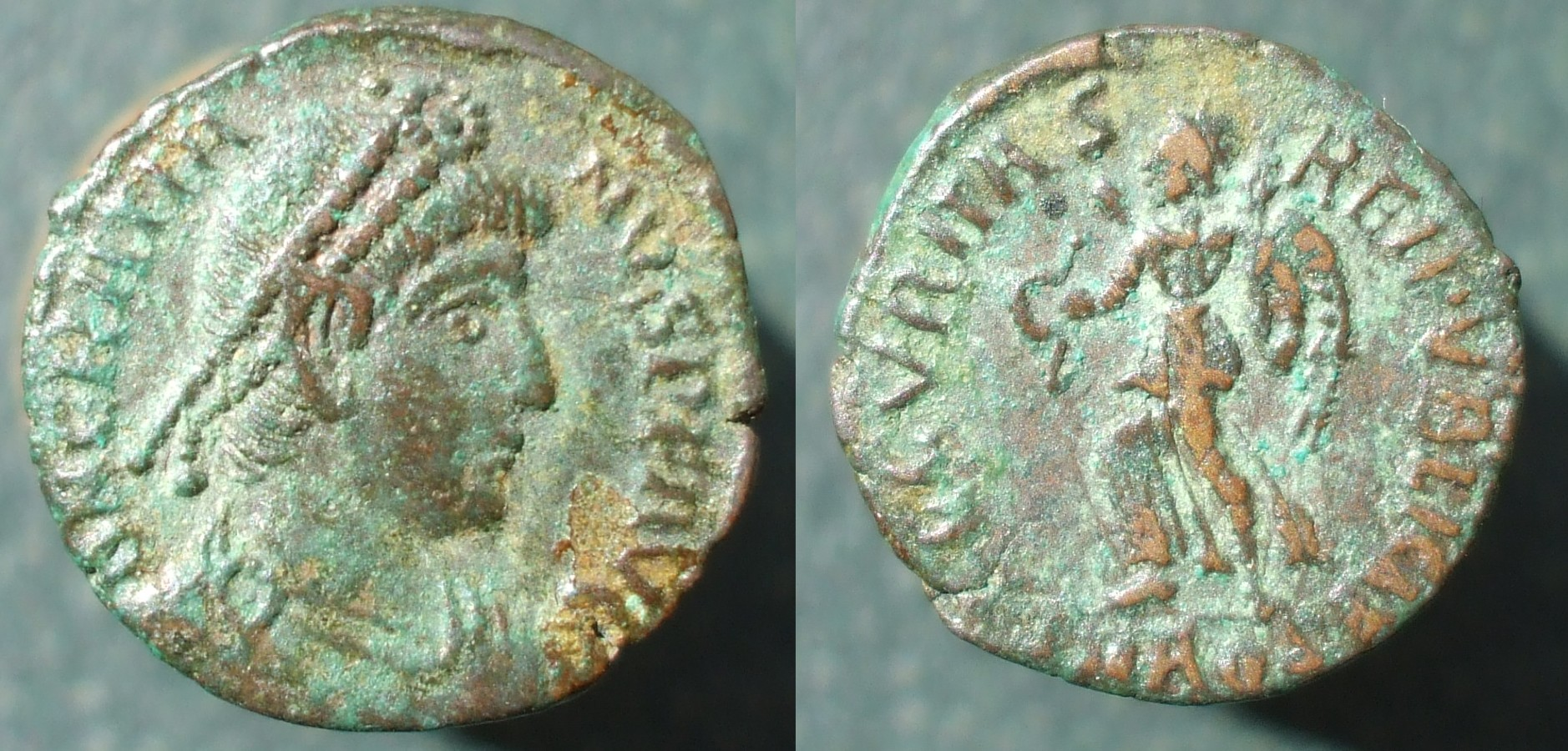 monnaie de Gratien, IVè siècle, Securitas